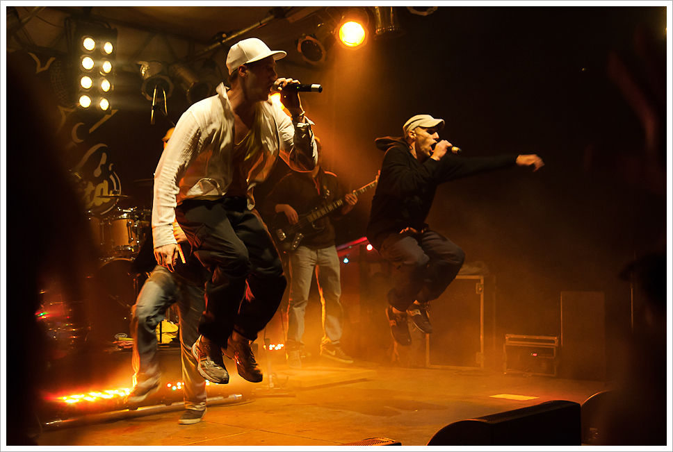 Irie Révoltés bei Mayday Berlin. Barrio Anfascista Stage, Kreuzberg